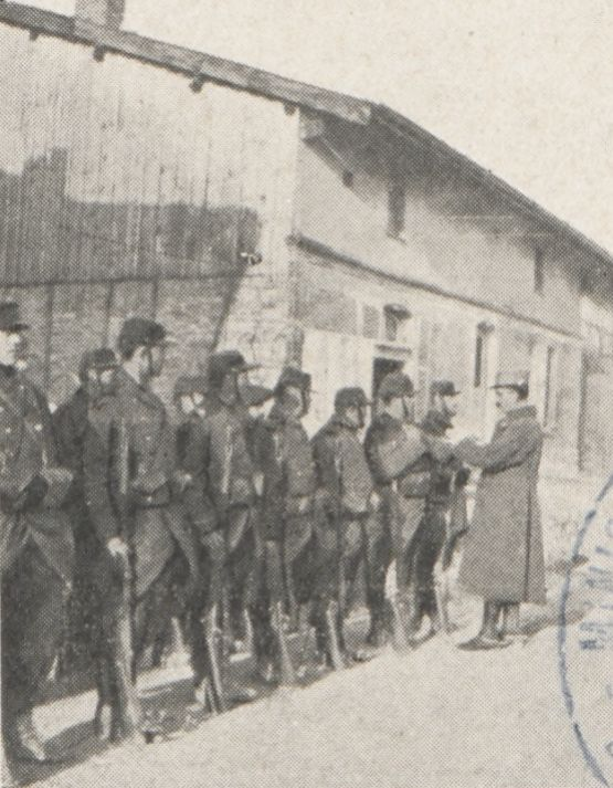 Historique 1914-1918 du 18e bataillon de chasseurs à pied Le commandant Espinouse